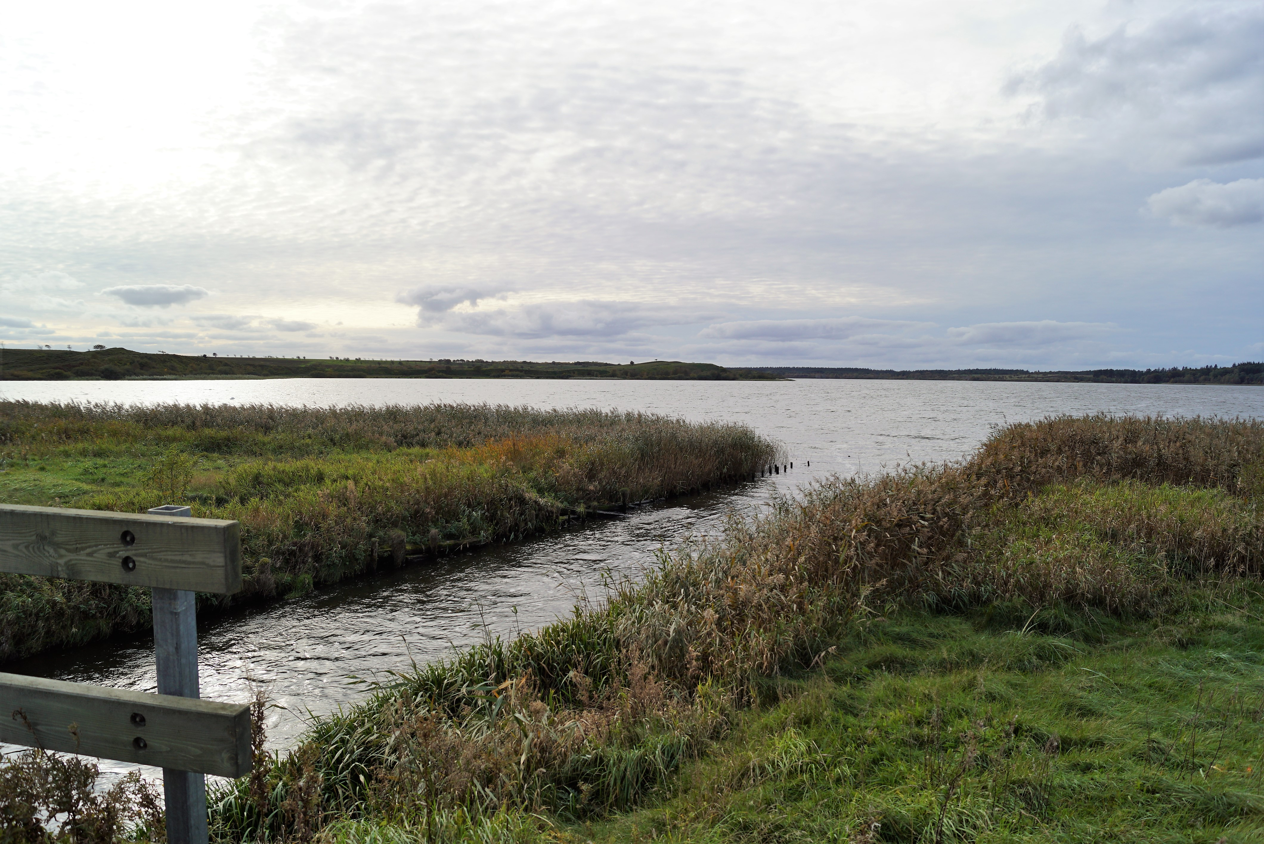 Nordenden af Flyndersø ved udløbet til Koholm Å